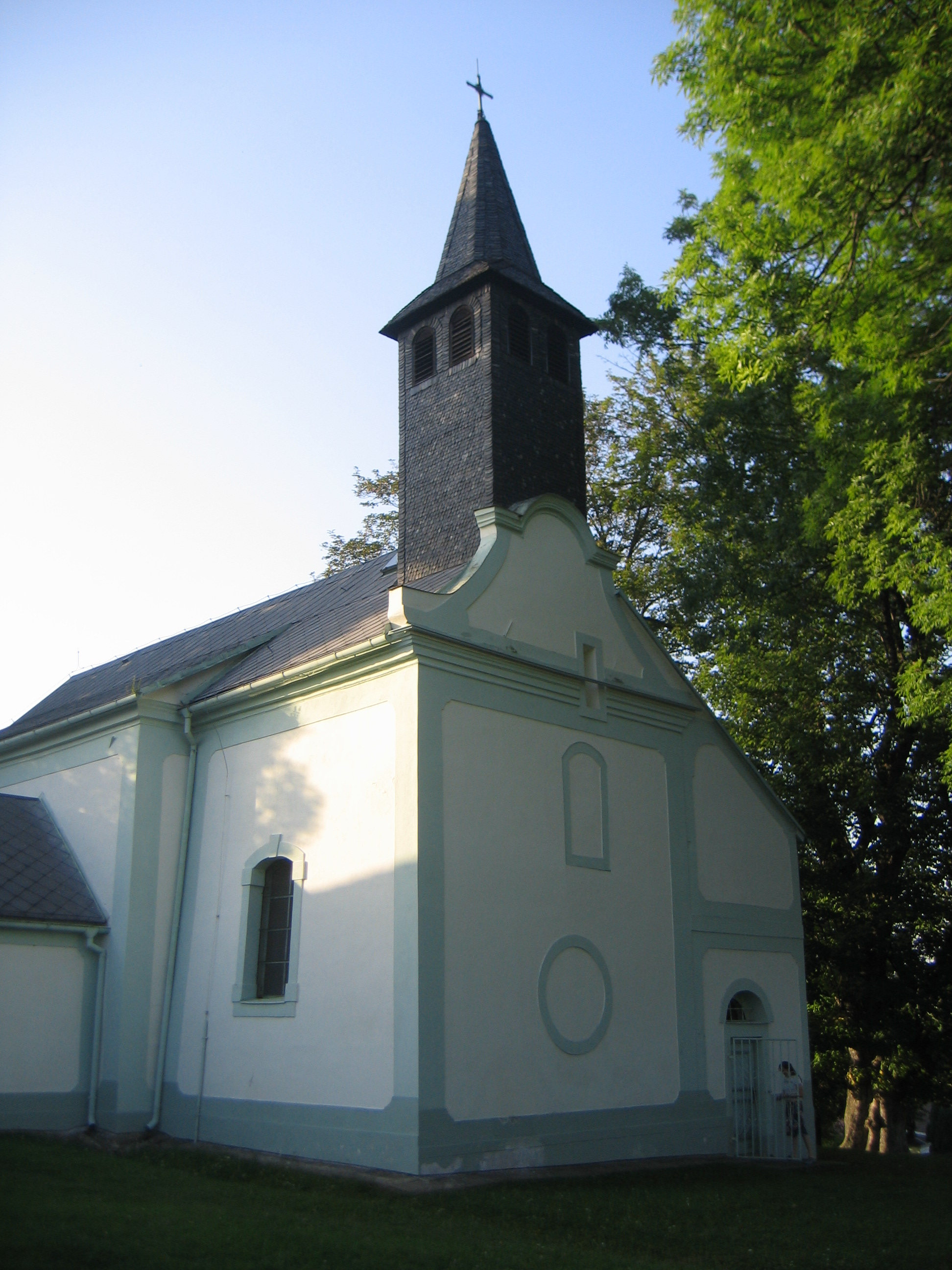 Dlouhá Ves (okr. Klatovy), kostel sv. Filipa a Jakuba od jihu.